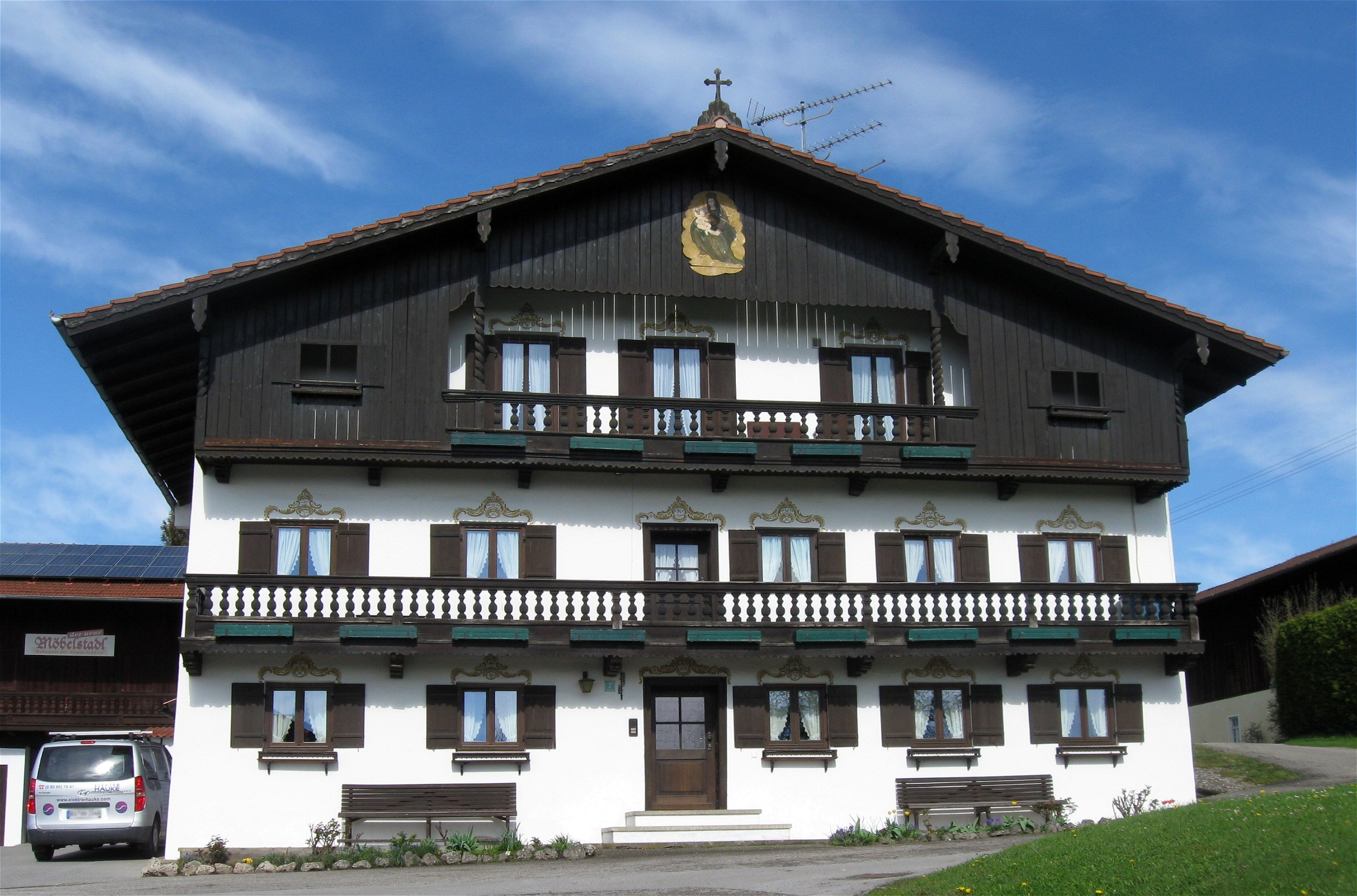 Römerring 2; Gottvater-Relief, wohl 18. Jh.; D-1-87-129-44ldach, Laube, Nische mit Laube an der Ostseite, Wirtschaftsteil mit Bundwerk an der Ostseite, Firstbalken bez. 1852, Erdgeschoss wohl älter. D-1-87-129-48